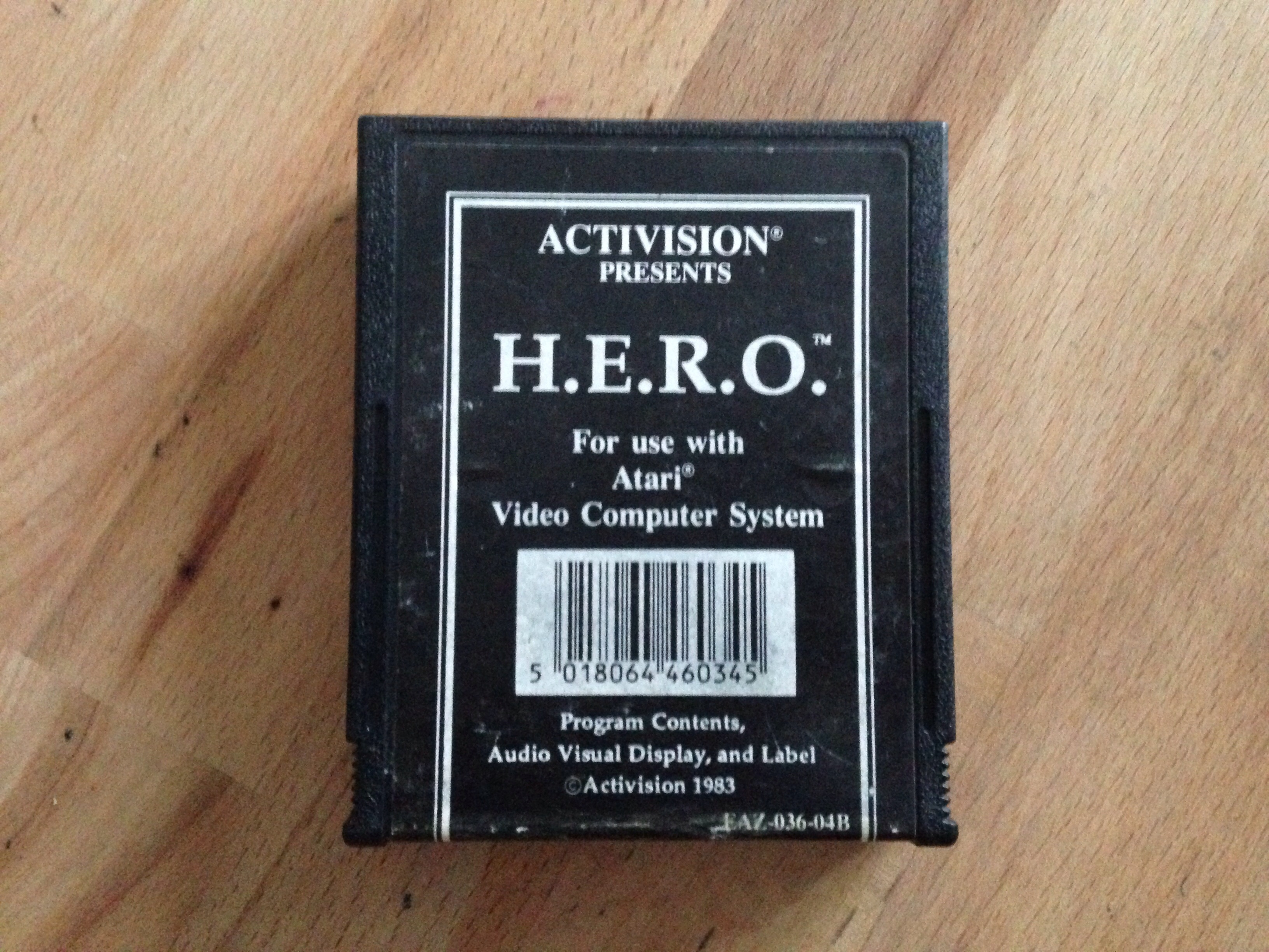 HERO Cartridge für Atari 2600